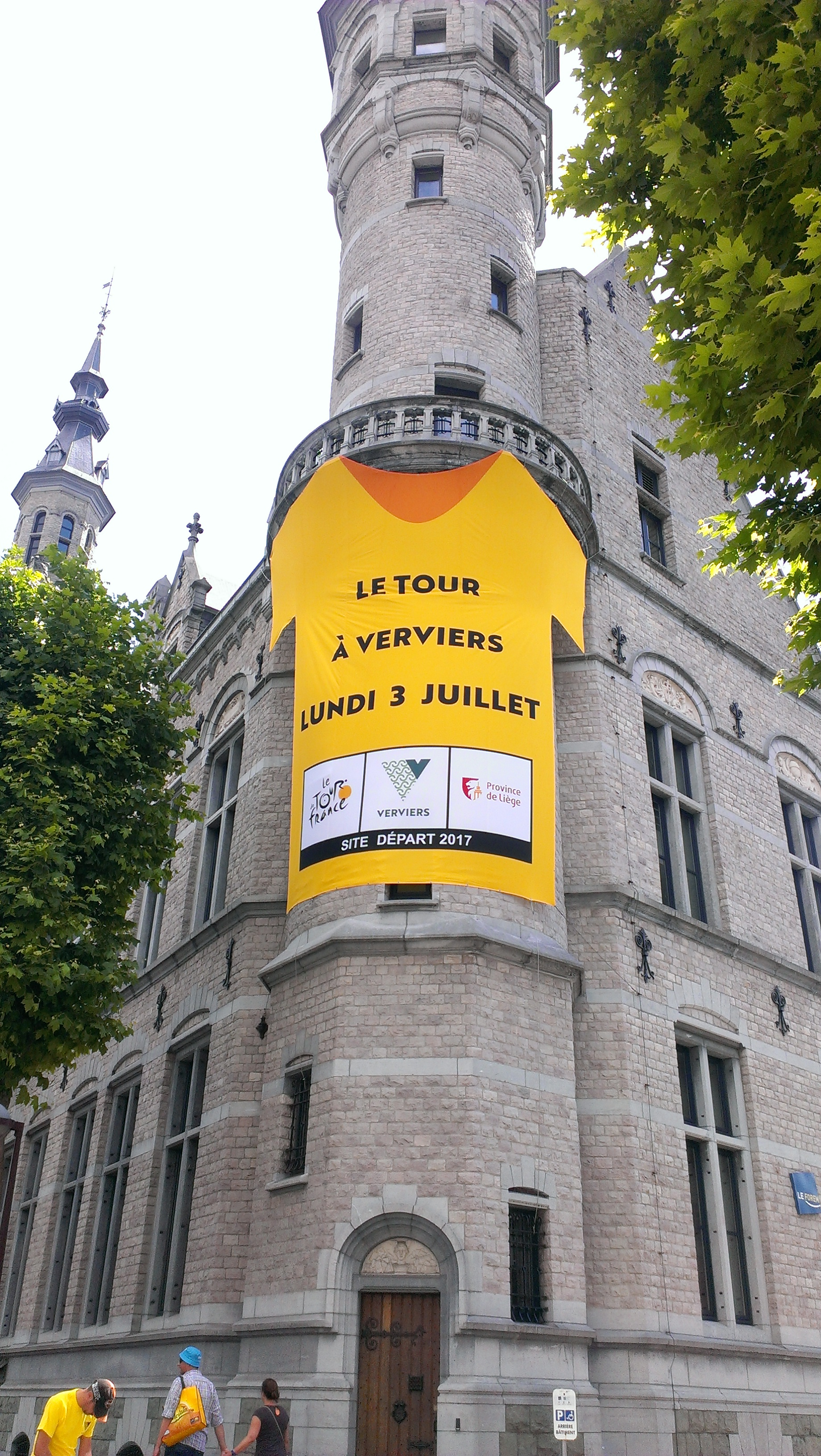 Start in Verviers (België) van de 3e etappe van Le Tour de France 2017.